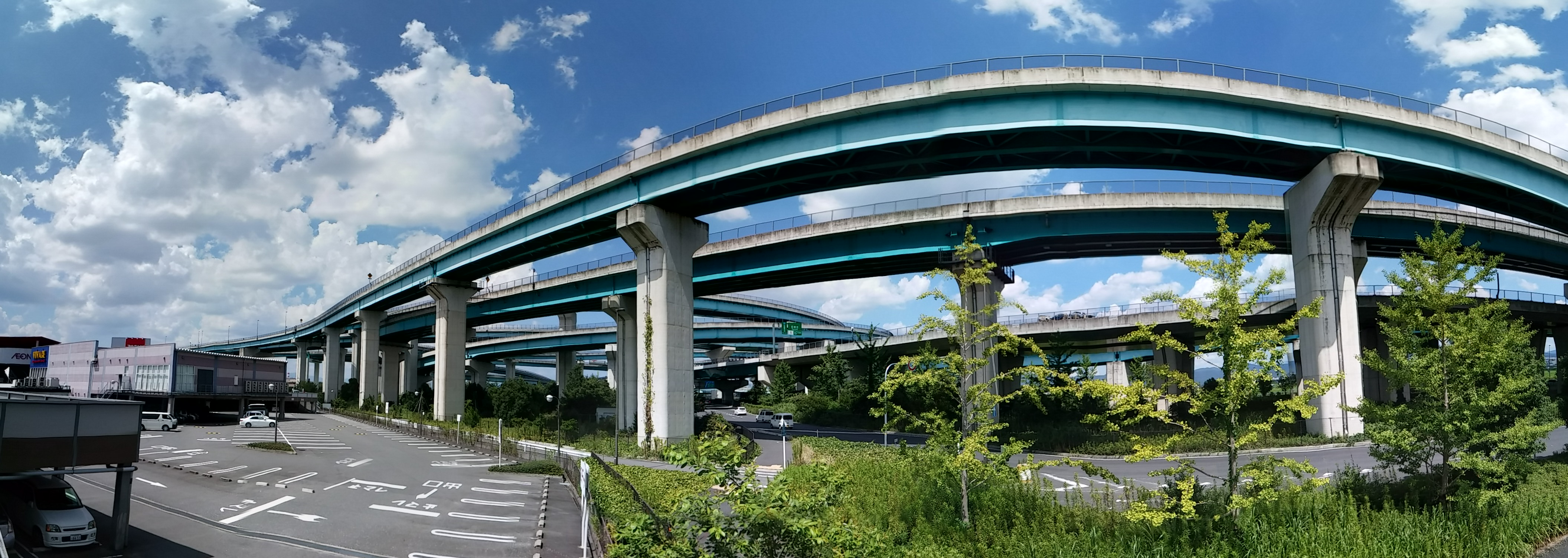 地上から見た久御山ジャンクション（京都府）